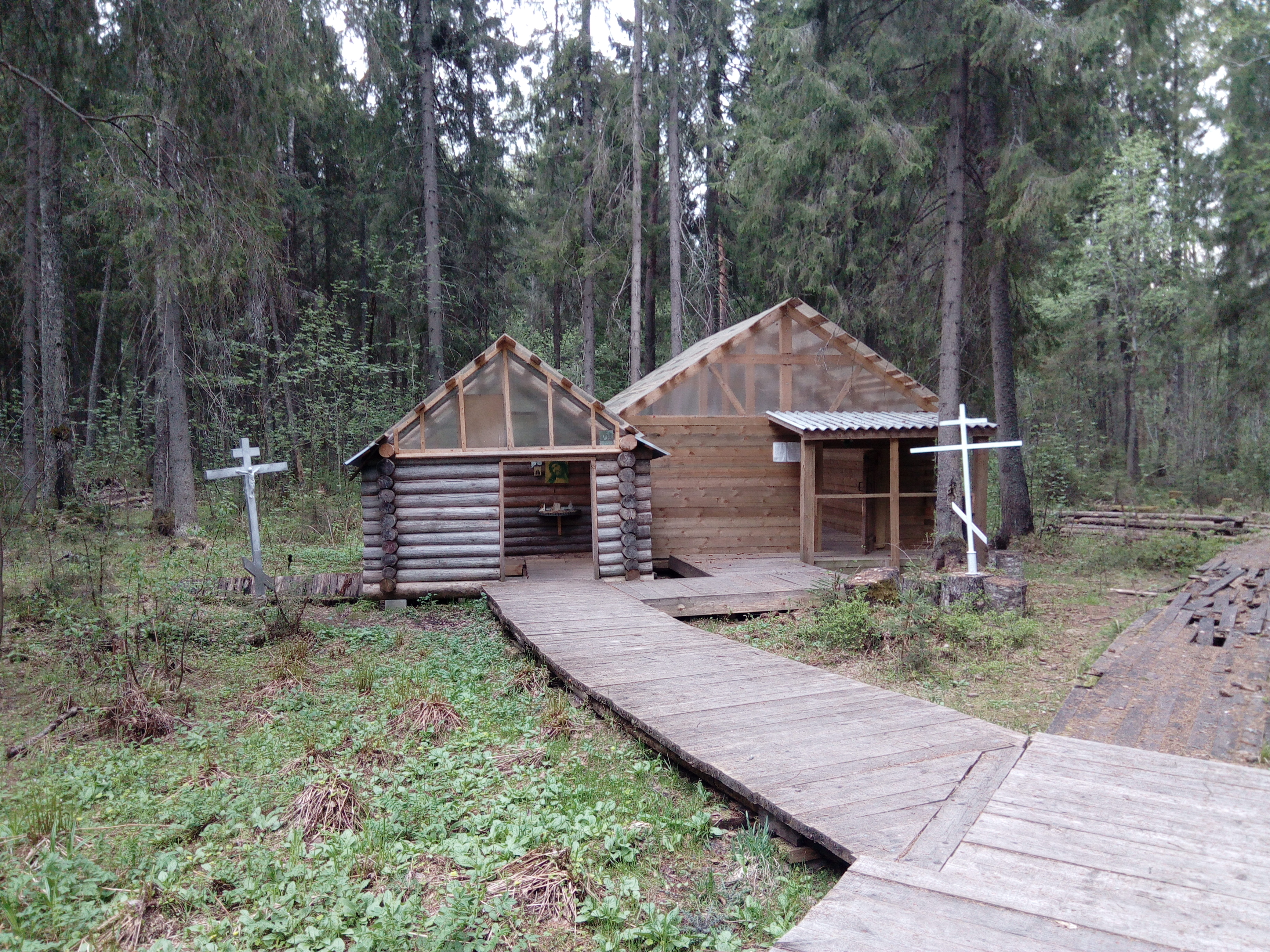 Луканинский Колодчик: расположен вблизи д.Луканино Пестяковского муниципального района. Ивановская область This image is related to the protected area of Russia number 3720209